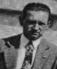 Károly Csapkay, allenatore ungherese